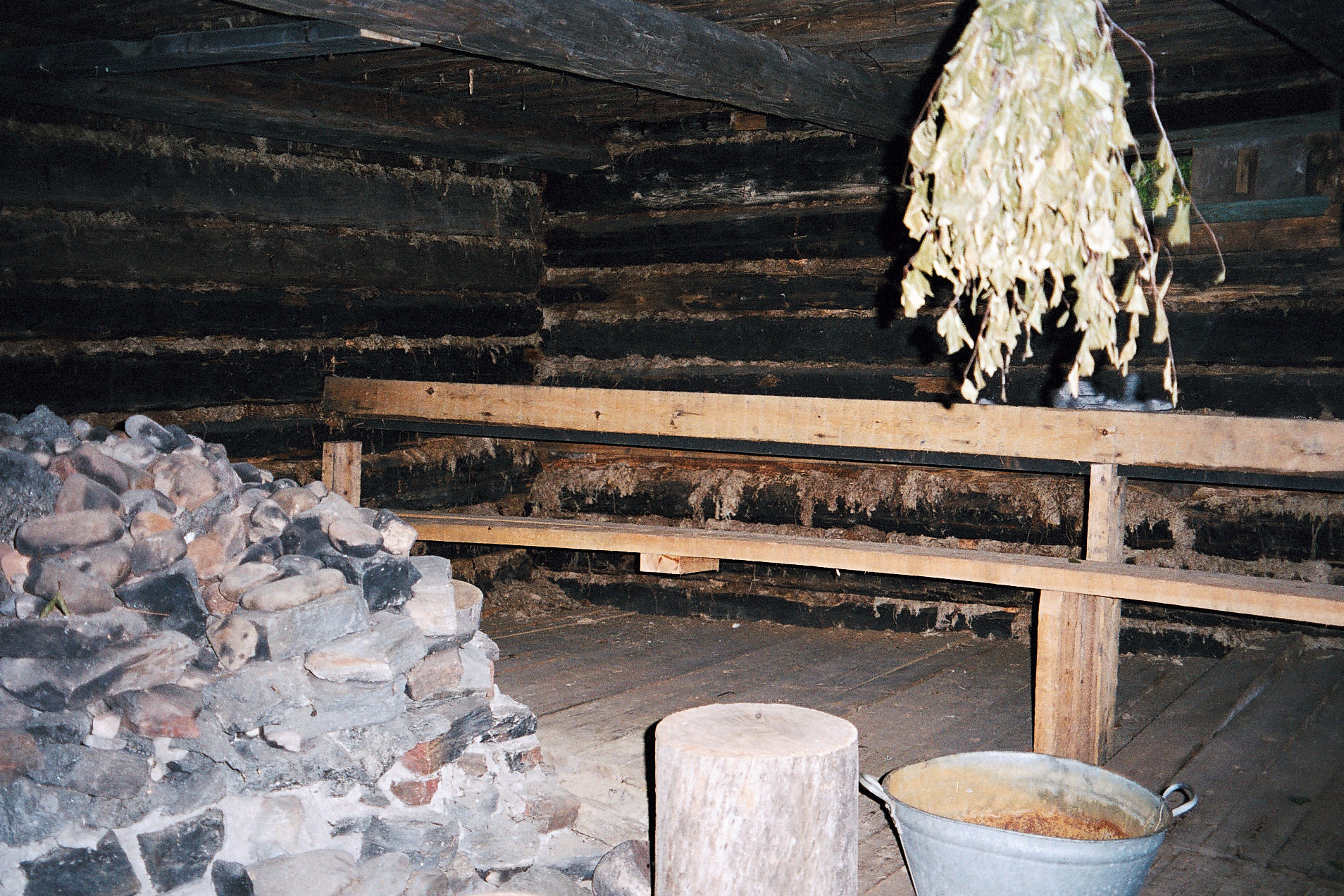 Savusaunan sisällä. Lapin metsämuseo Rovaniemellä